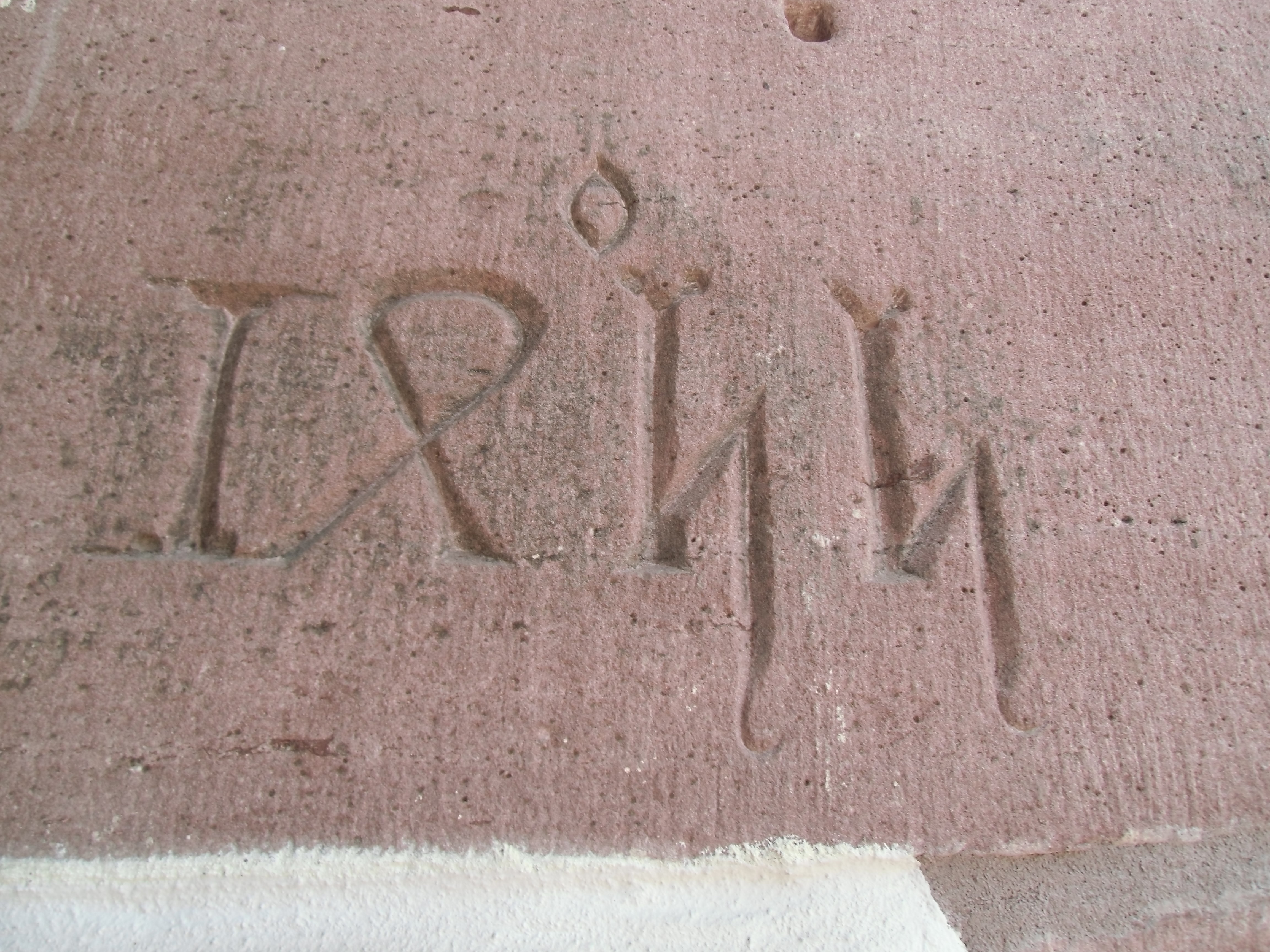 Jahreszahl 1444 - am Turm der Evang. Kirche in Ebhausen